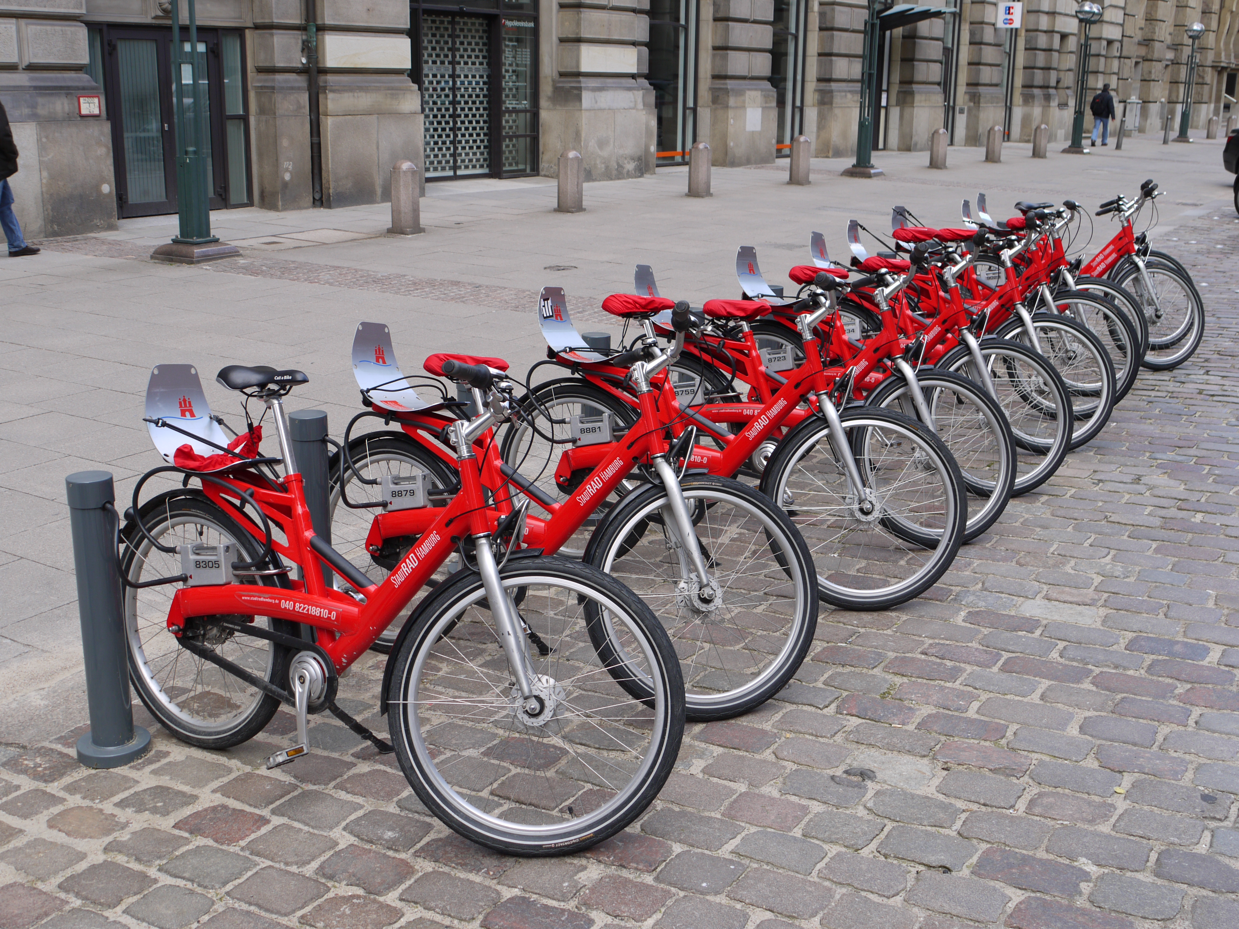 Leihfahrräder an einer Leihstation in Hamburg.